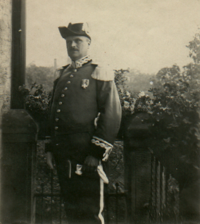 Albert Lehr, Bahnarchitekt, in Eisenbahneruniform, 1913.